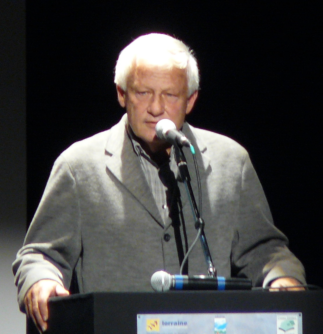 Lionel Chouchan aux Fantastic'Arts 2008